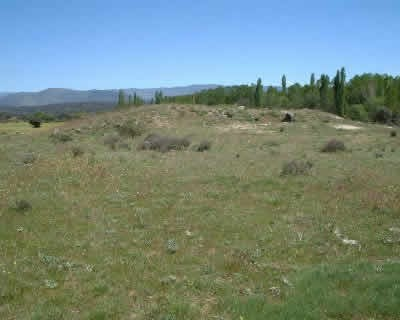 Vista general del dolmen llamado EL Turrión, Navamorales (Salamanca, Castilla y León).